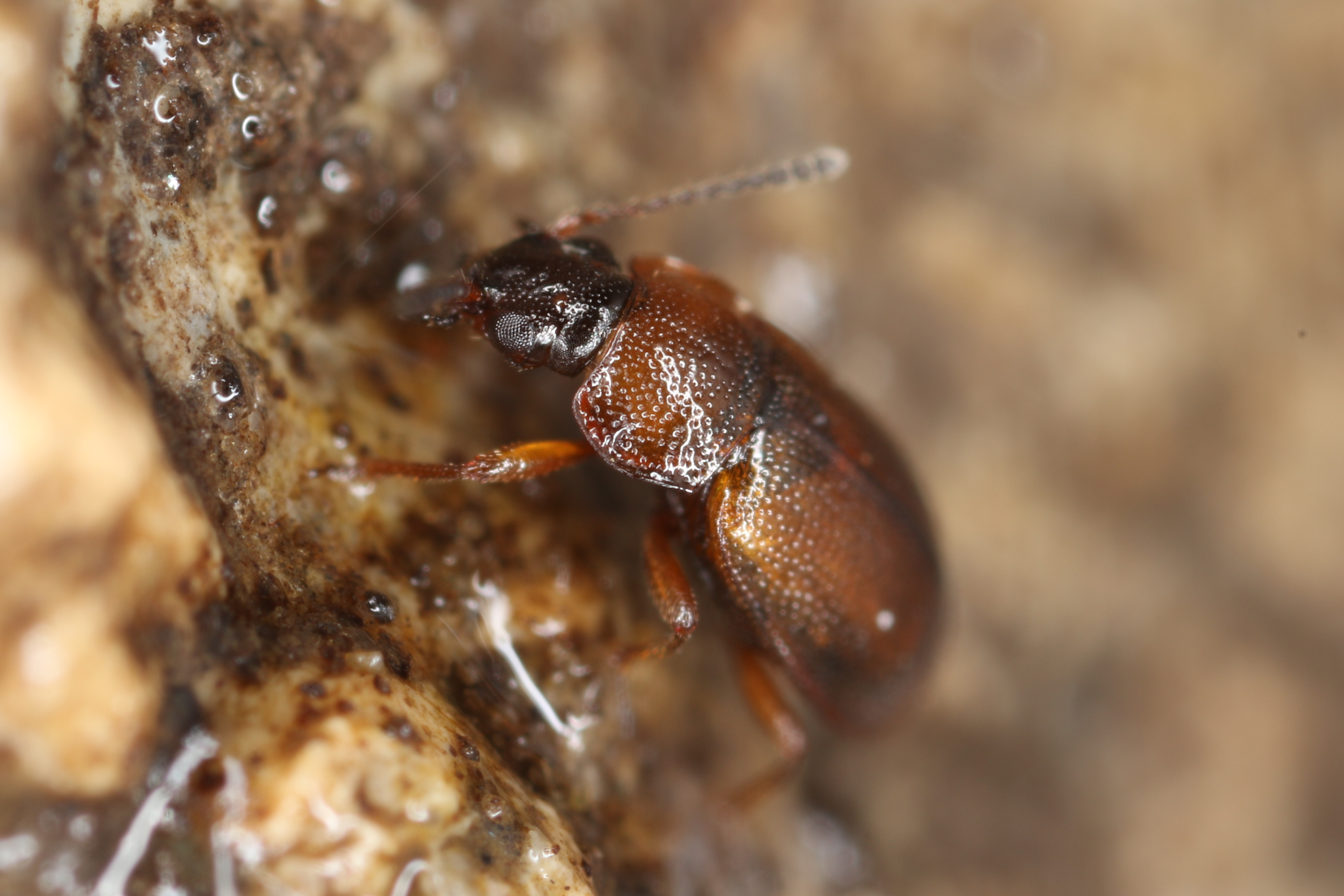 Anthobium atrocephalum (Gyllenhal 1827), Søborg, Denmark, 24 April 2016